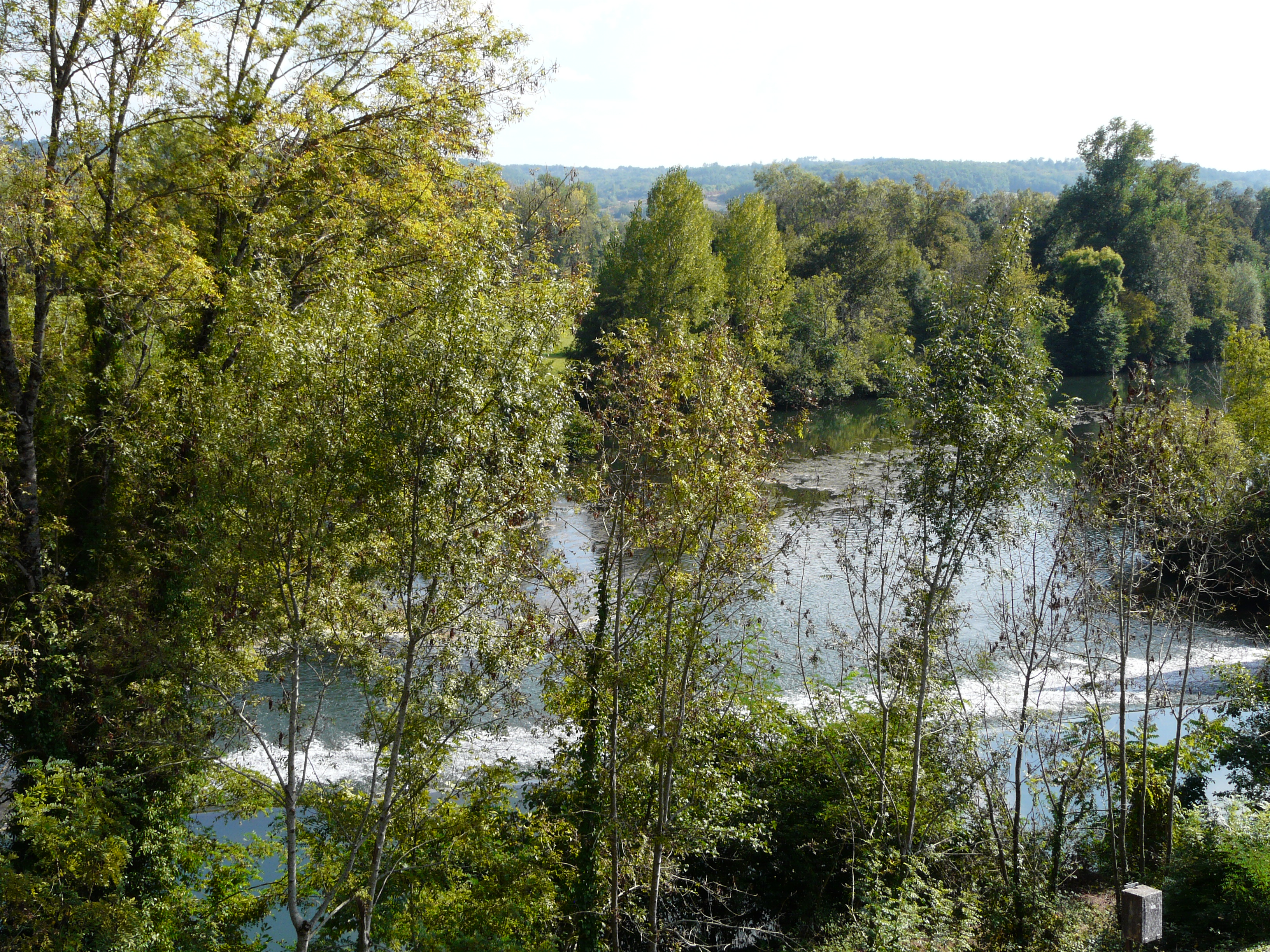 L'Isle vue depuis la terrasse du château de Mauriac, Douzillac, Dordogne, France. De l'autre côté de l'Isle, la commune de Neuvic.